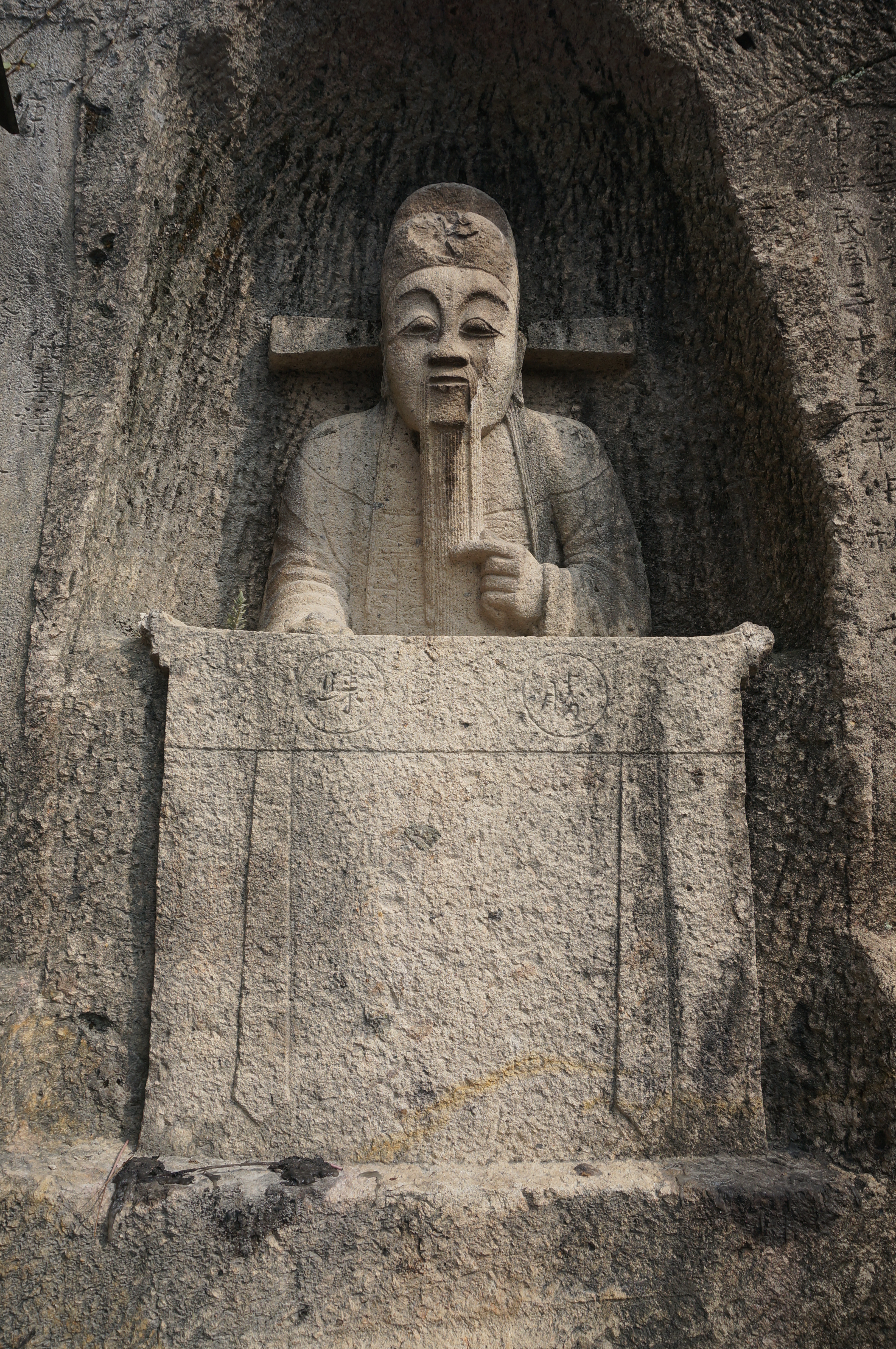 胡公岩摩崖石刻，胡宗宪像。